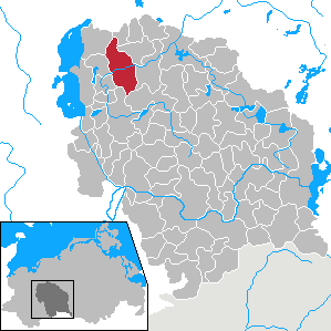 Kuhlen-Wendorf in Mecklenburg-Vorpommern - District Parchim